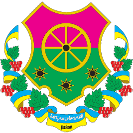 Герб Антрацитівського району